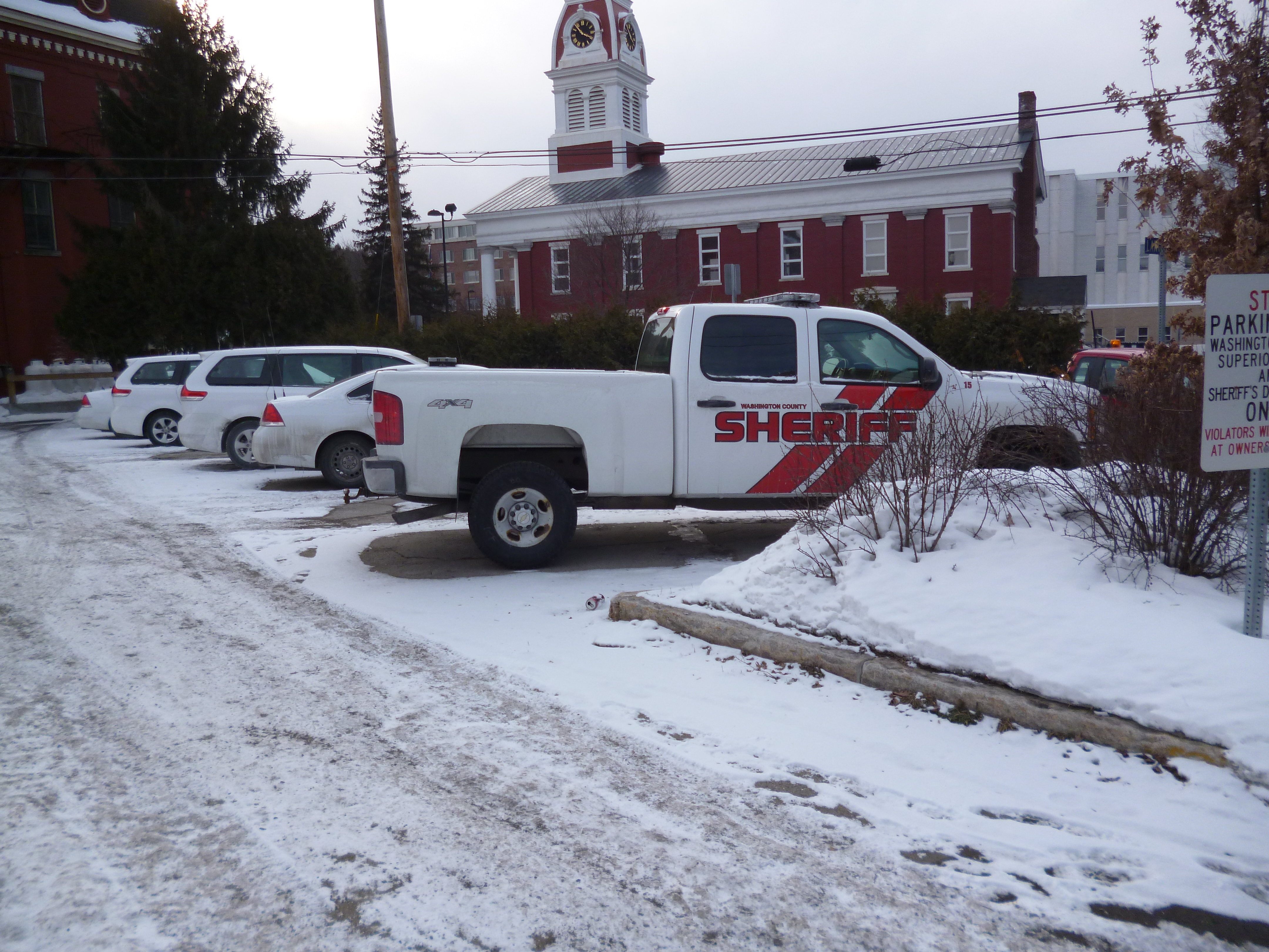 Montpelier, dans l'état du Vermont,aux Etats-Unis.